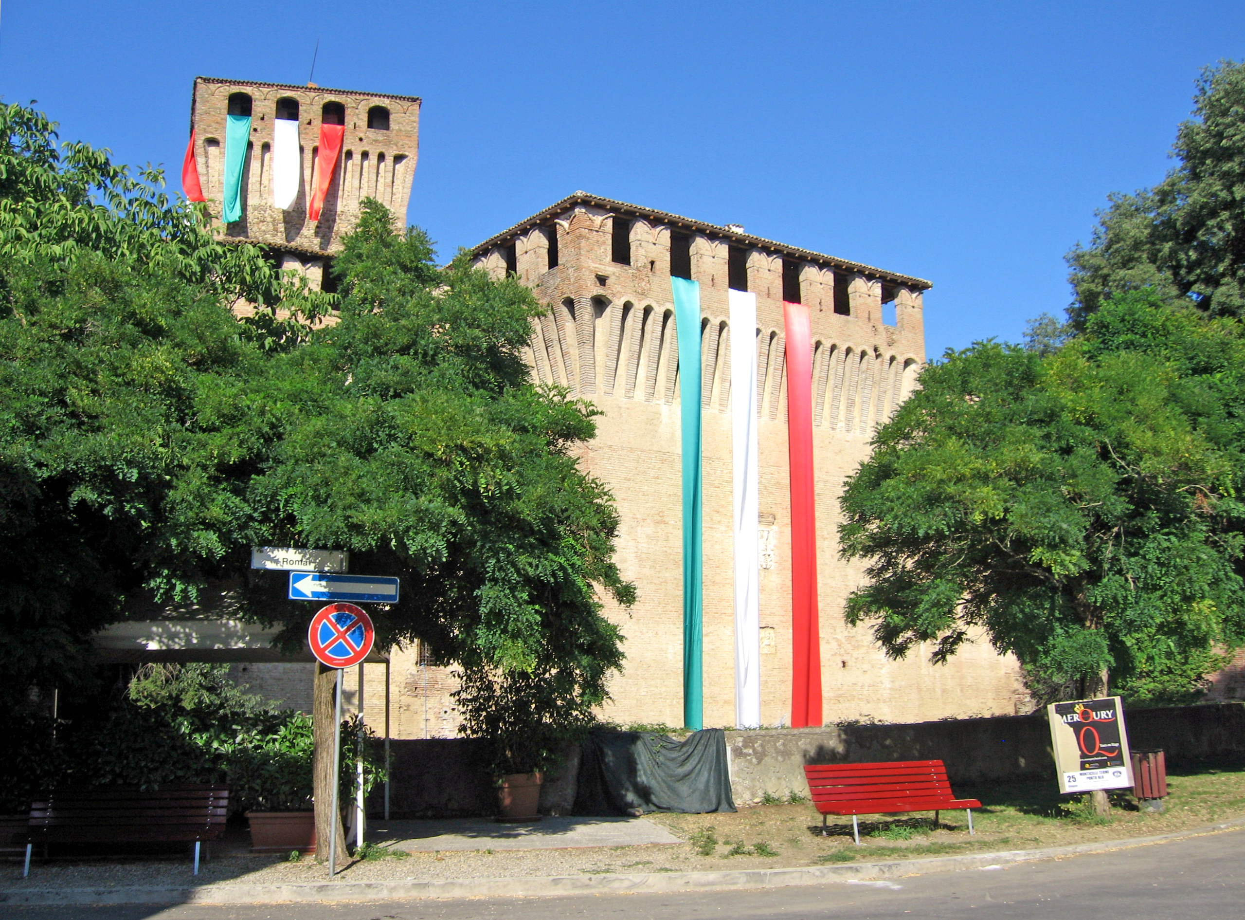 Castello di Montechiarugolo (fronte sud-ovest)